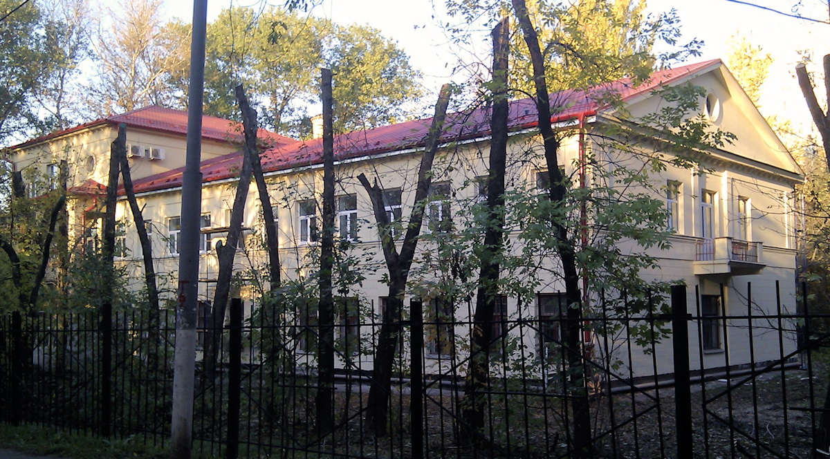 Москва, Бирюлёвская улица, дом 12, корпус 3. Здание Госкомрезерва.